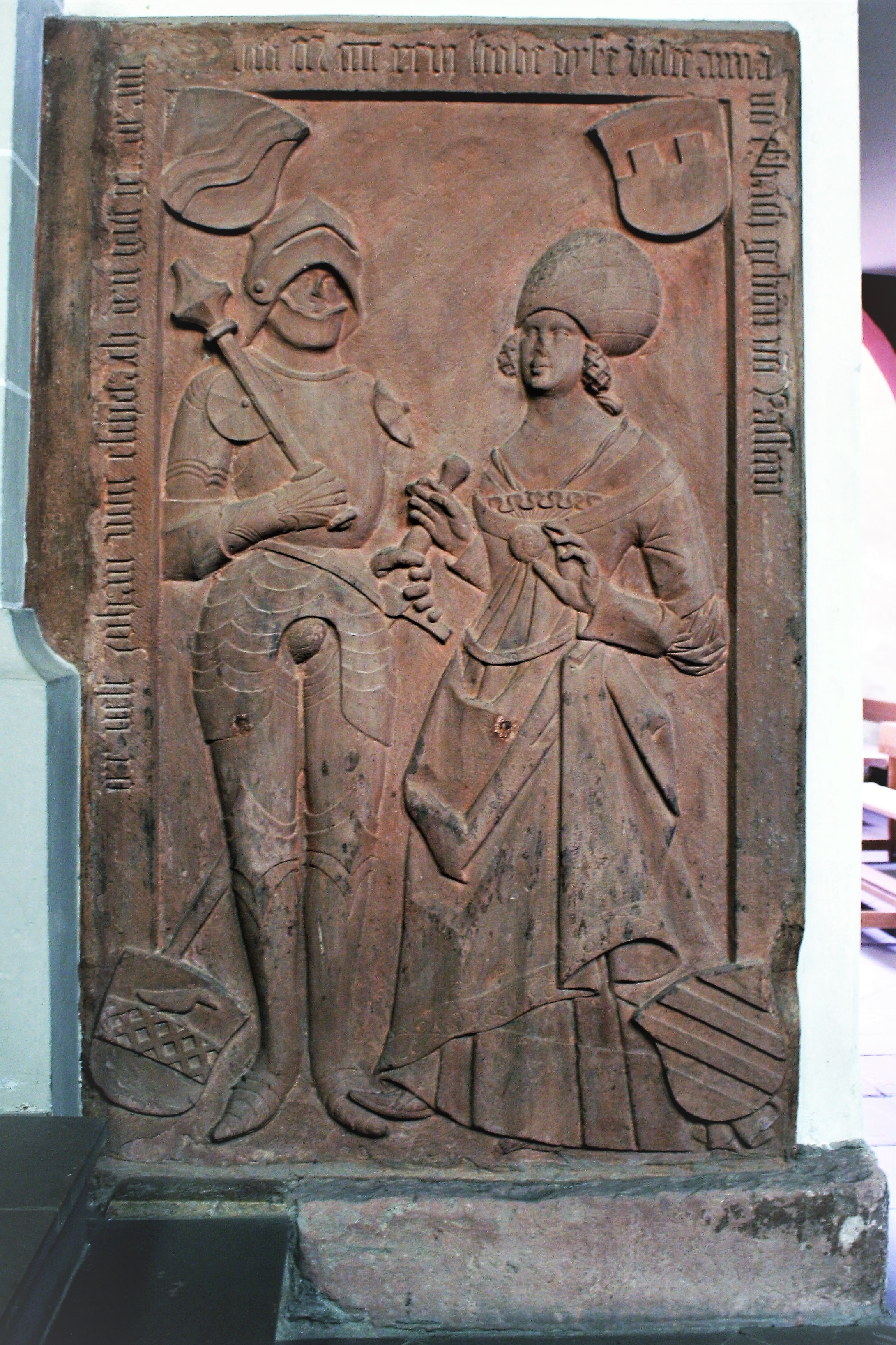 Epitaph: Johann v. Eschbach u. Anna v. Rossau aus rotem Sandstein, entstanden 1496. Wappen oben: v.l.n.r. von Eschbach, von Rossau. Wappen unten: v.l.n.r. Specht von Bubenheim, von Elm.[1][2] ↑ ↑